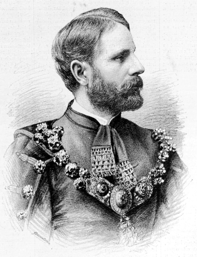 gróf Khuen-Héderváry Károly (1849–1918) politikus, miniszterelnök portréja